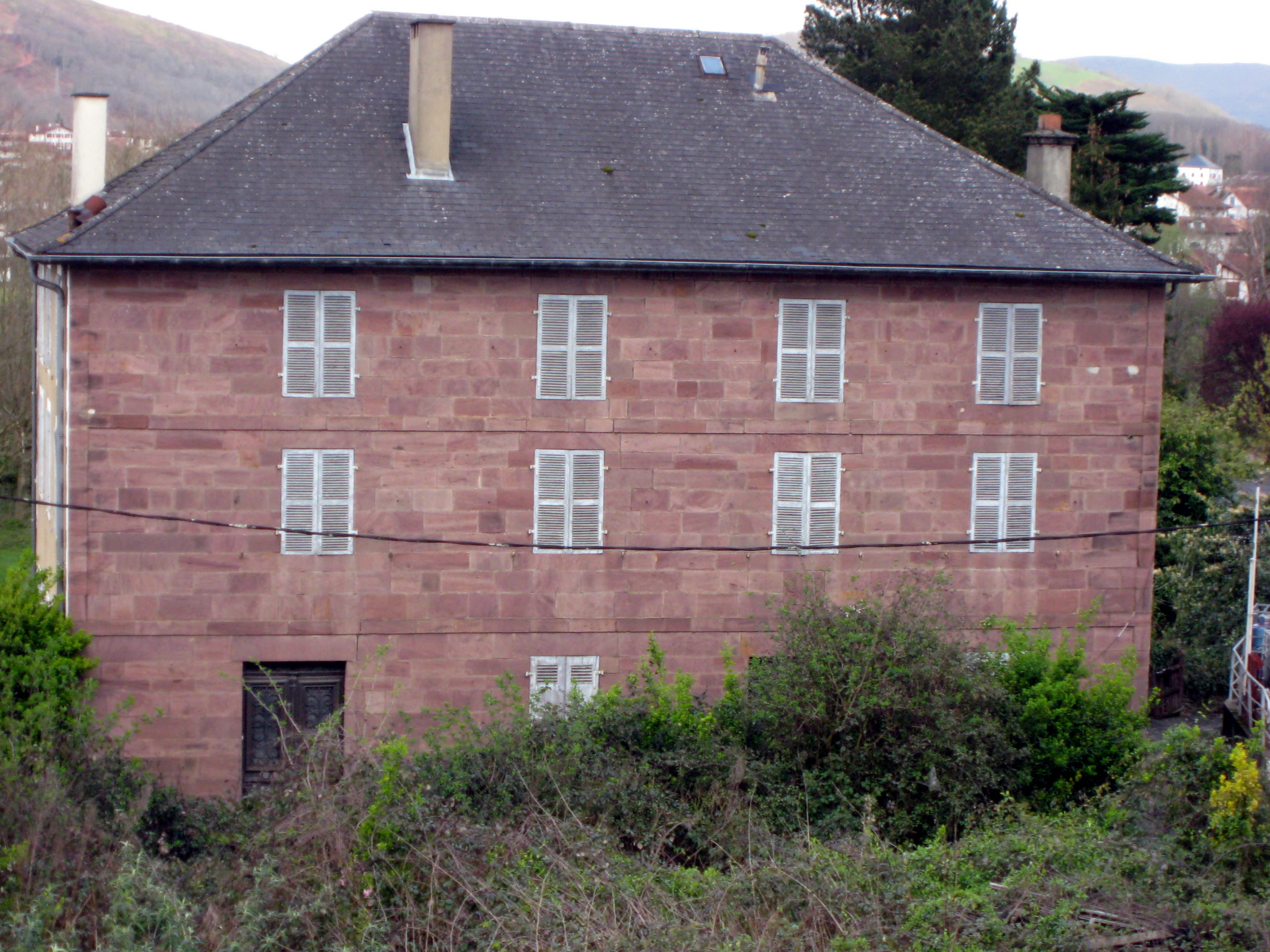 Maison de grès rose à Uhart-Cize (Basse-Navarre)(Pyrénées-Atlantiques) (Pyrénées).